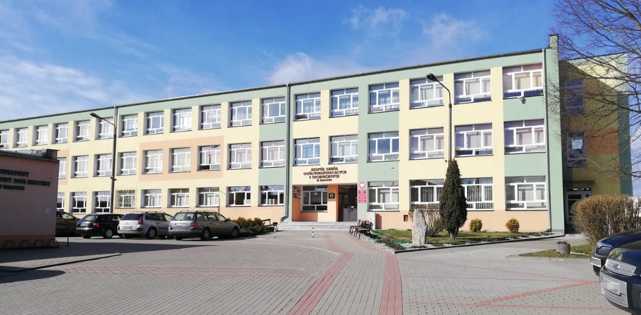 Szkoła znajdująca się w Miastku, położonym w województwie pomorskim. Zespół Szkół Ogólnokształcących i Technicznych w Miastku ul. Młodzieżowa 3, 77-200 Miastko